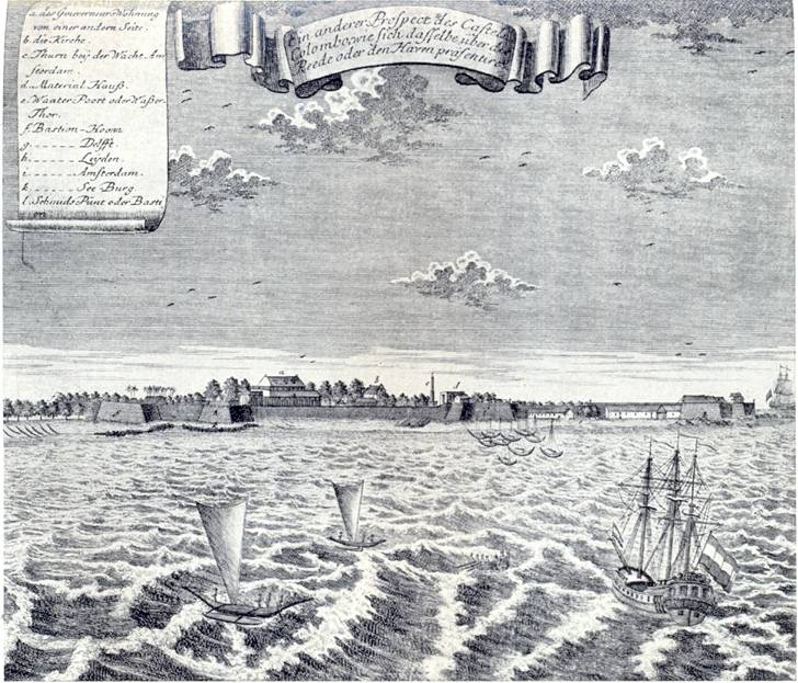 Ansicht von Colombo gegen Mitte des 18. Jahrhunderts